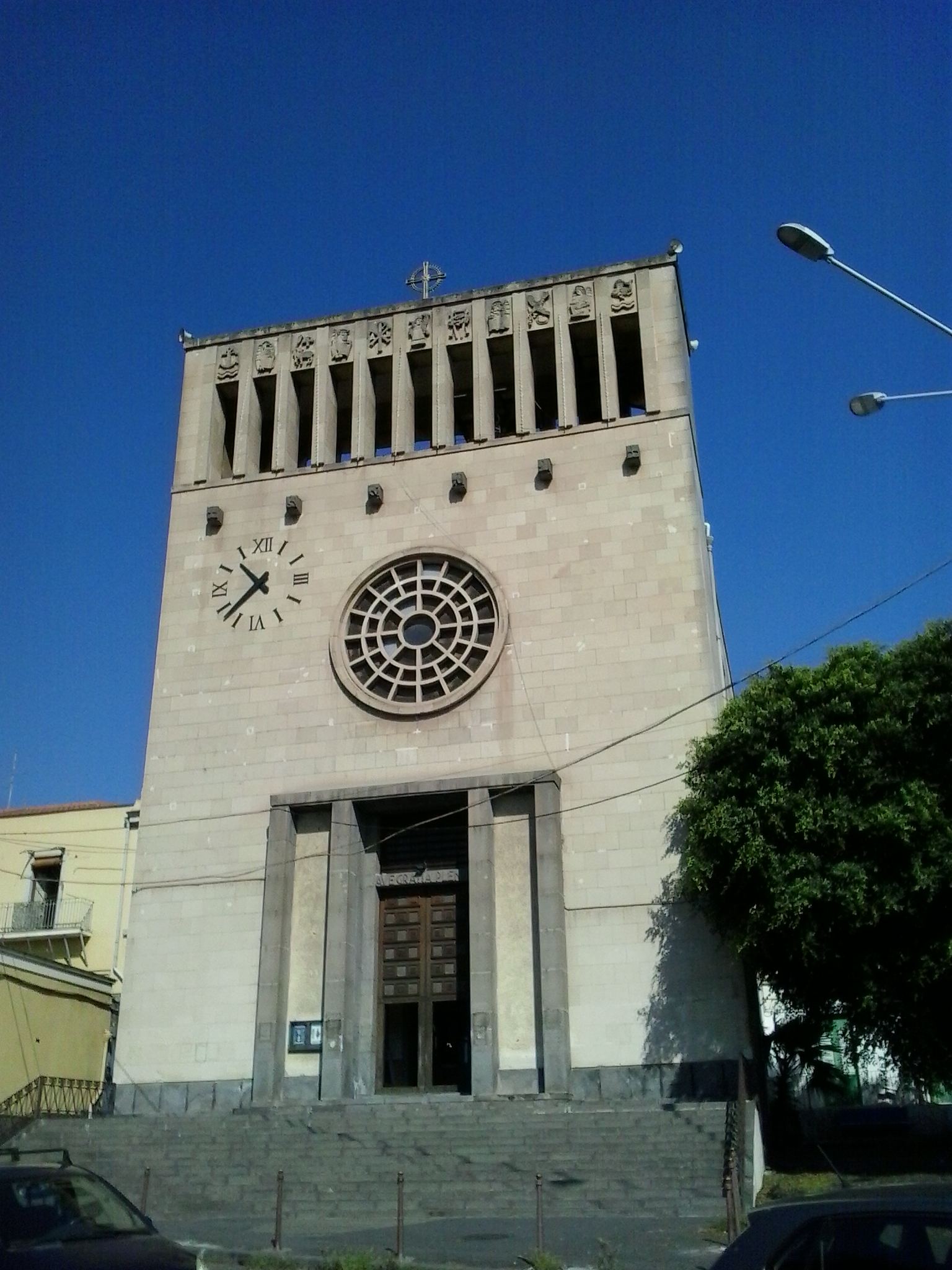 Prospetto della Chiesa della Divina Maternità della Beata Vergine Maria di Catania, quartiere Cibali.